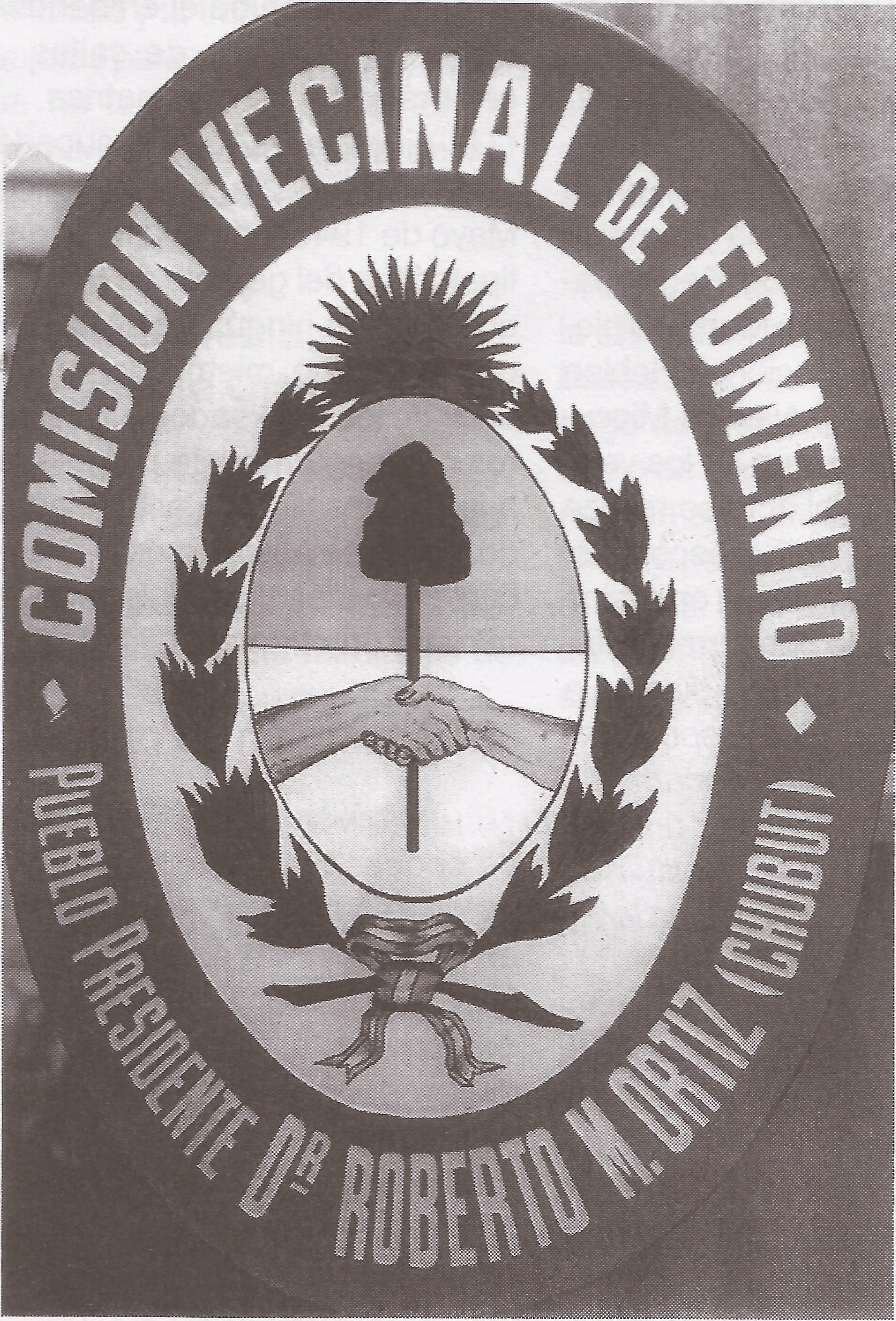 Escudo del Pueblo Presidente Ortiz creado por los vecinos que deseaban formar un comisión de fomento y ser localidad aparte de Comodoro Rivadavia. 1939